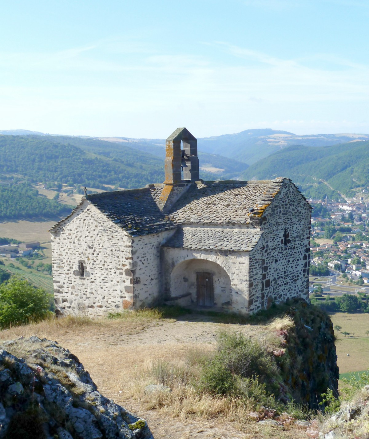 Vue sur la Chapelle sainte-Madeleine de Chalet (Massiac, Cantal, auvergne, France)